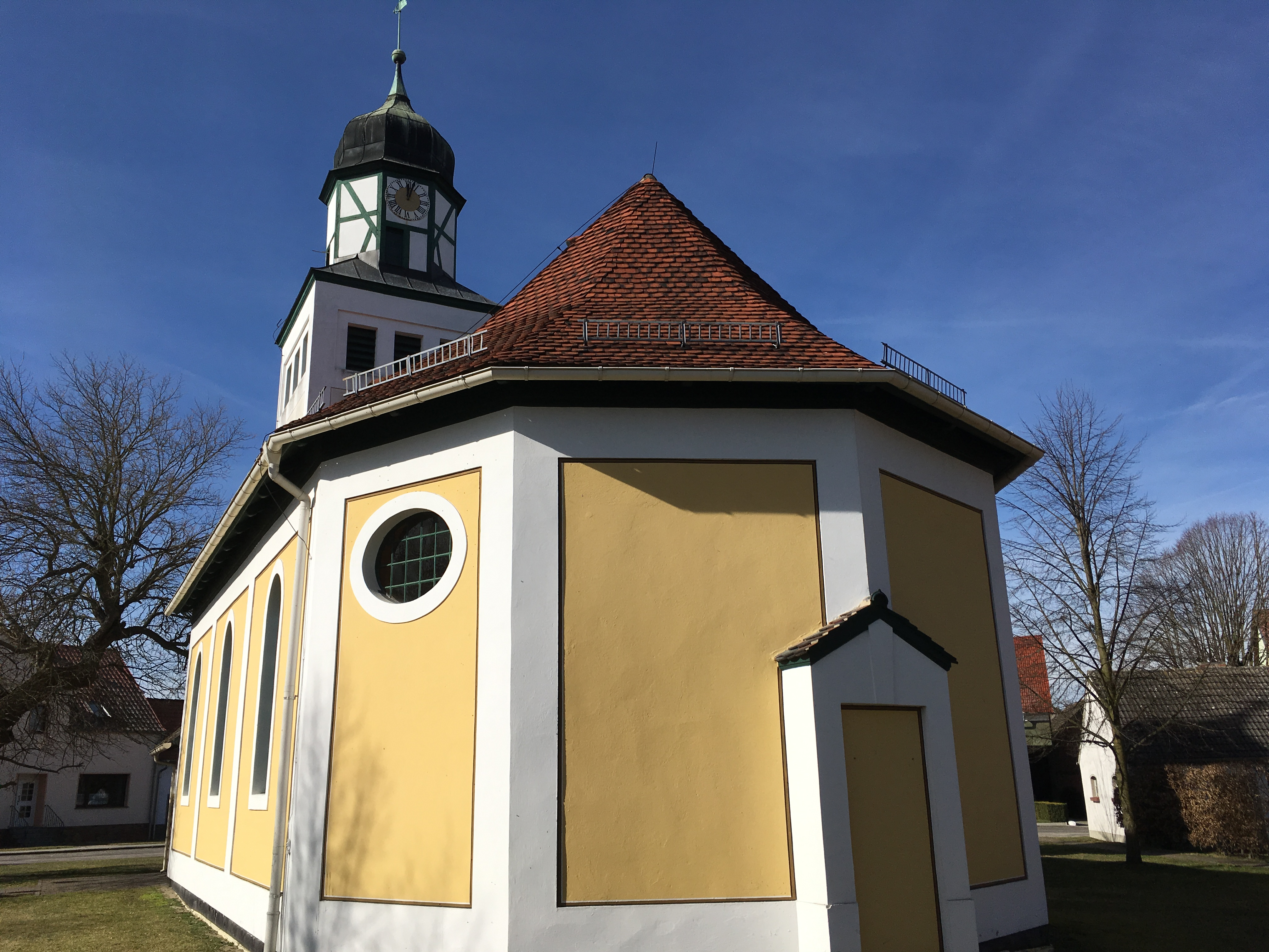 Die Dorfkirche in Alt Bork (Linthe, Brandenburg) ist eine neubarocke Saalkirche, die 1910 im Stil der Heimatschutzarchitektur errichtet wurde. Im Innern befinden sich Ausstattungsstücke aus der Zeit um 1700.